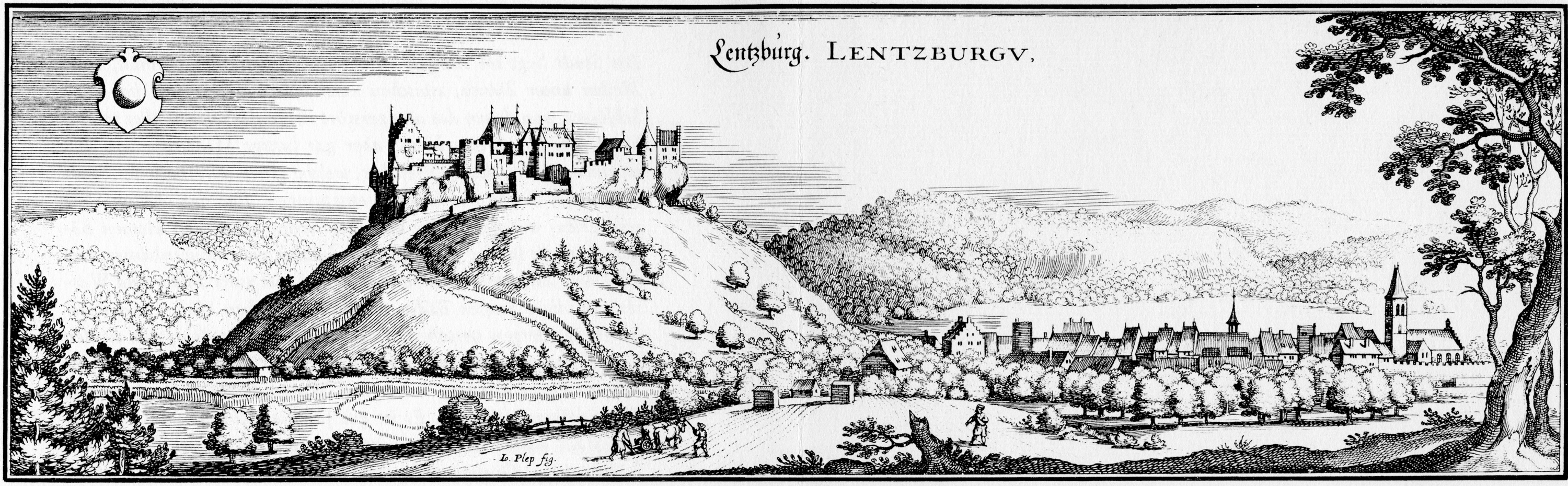 Ansicht der Lenzburg im heutigen Kanton Aargau um 1642